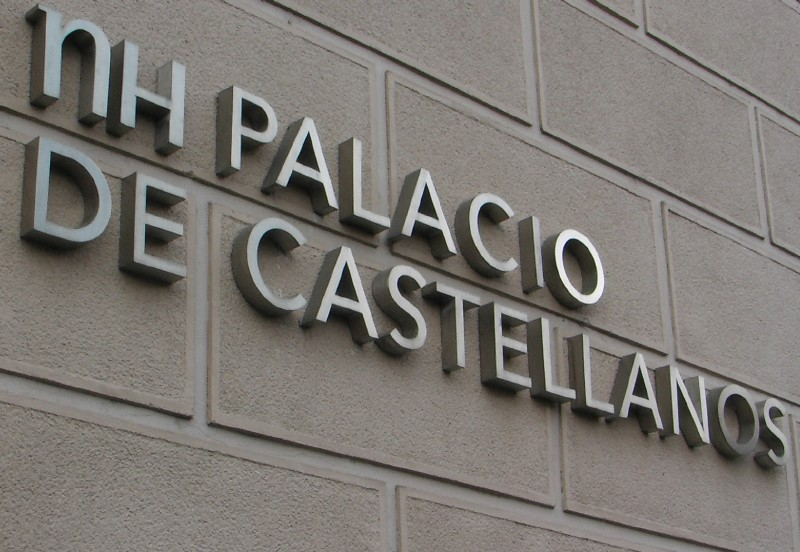 NH Palacio de Castellanos (Salamanca)